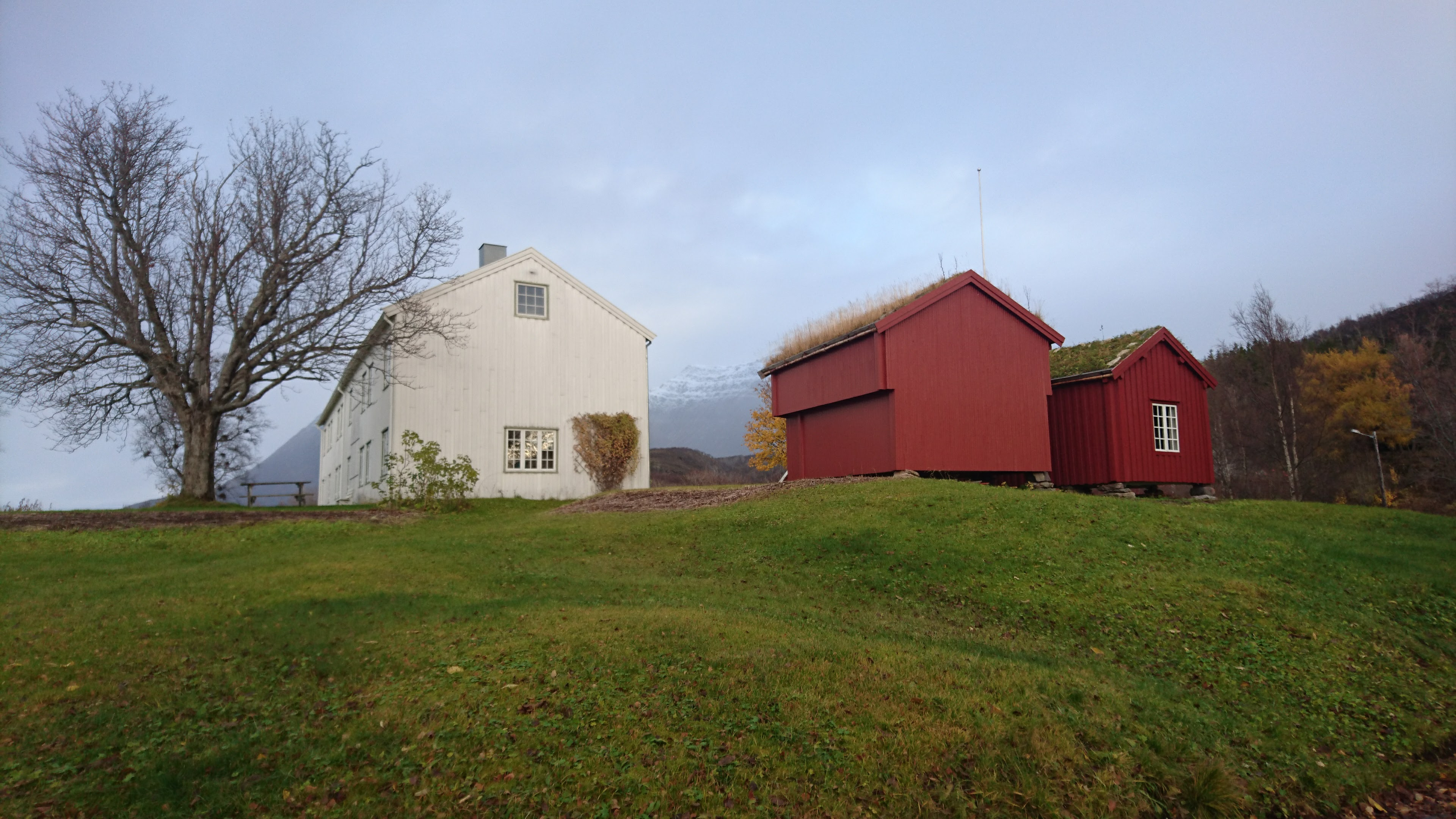 Gildeskål prestegård